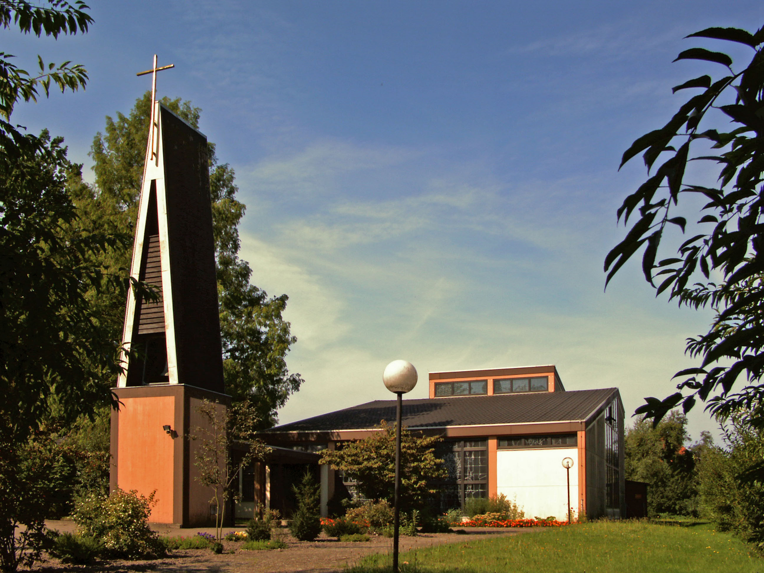 Katholische Kirche St. Maria Goretti in Meinersen, Landkreis Gifhorn, Germany